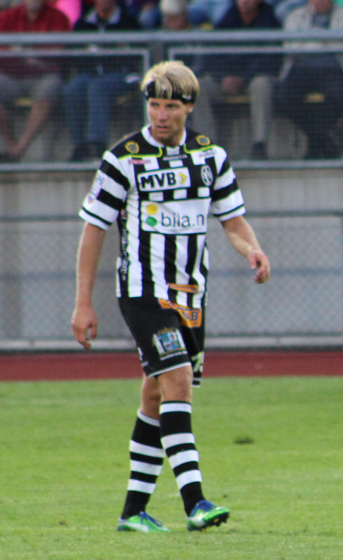 Fredrik Karlsson, forward i Landskrona BoIS.